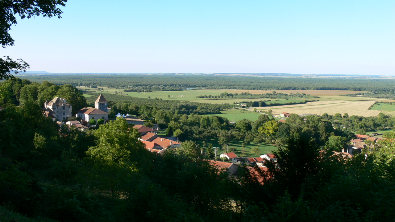 Panorama sur la Forêt de la Reine, Meurthe-et-Moselle & Meuse, région Lorraine, France. Au premier plan le villag de Boucq dominé par son château et son église